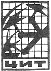 Description Эмблема Центрального института труда Date1922Source«Трудовые установки», М., ЦИТ, 1924Authorавтор лого неизвестен, скан - собственная работа Эмблема Центрального института труда